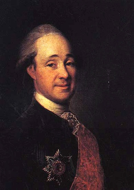 Идентификация изображённого лица как князя М.М. Щербатова ошибочна.